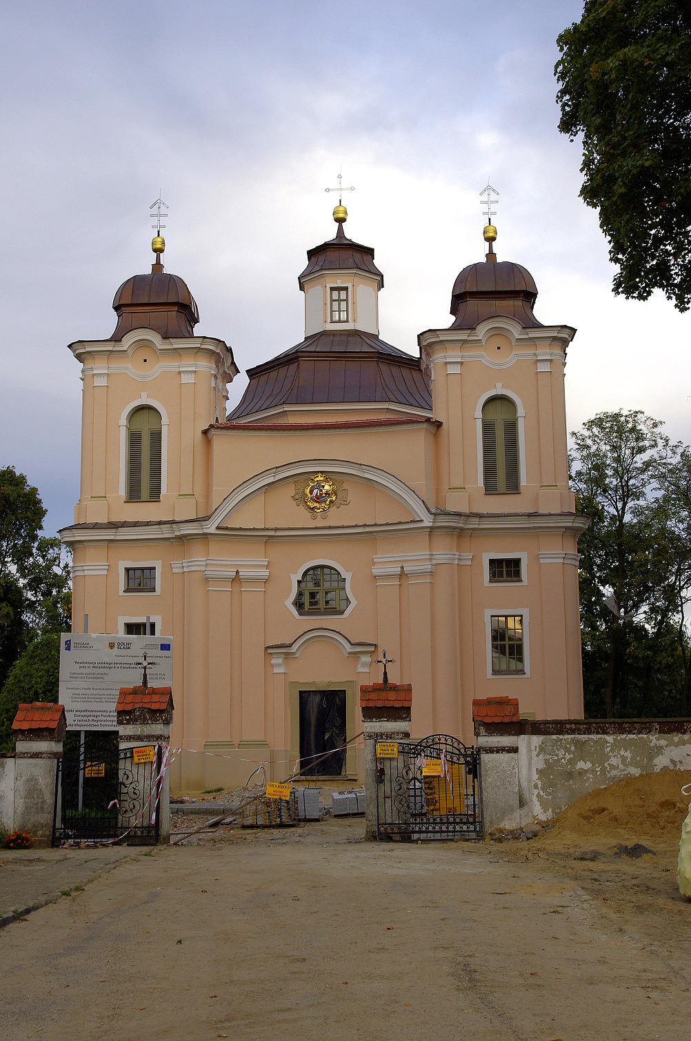 Cieszków, ul. Waryńskiego - dawny kościół dworski, obecnie parafialny pw. Wniebowzięcia NMP, widok od frontu (zabytek nr A/1323/1019 z 13.01.1964)